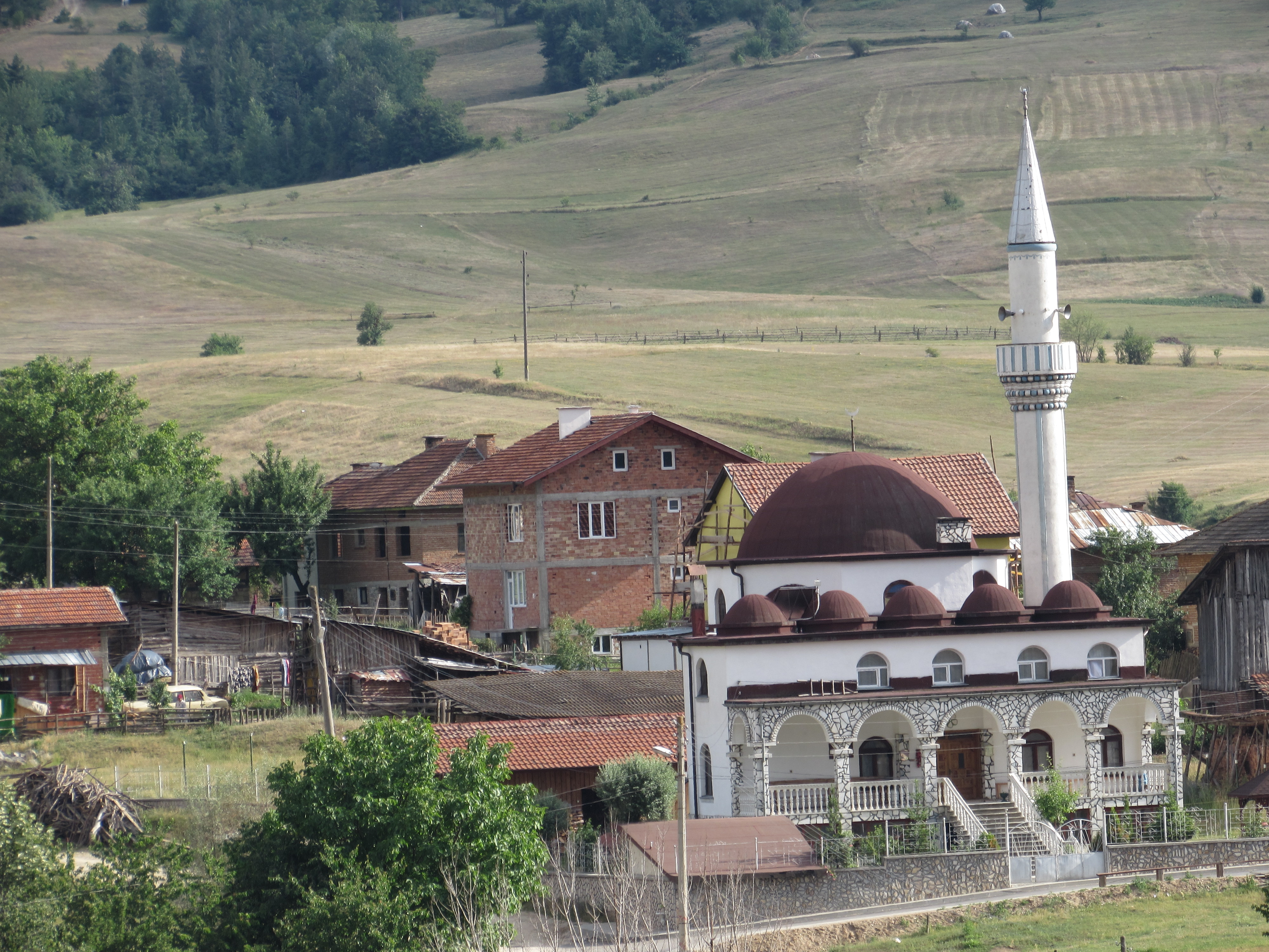 Джамията в с. Горно Краище